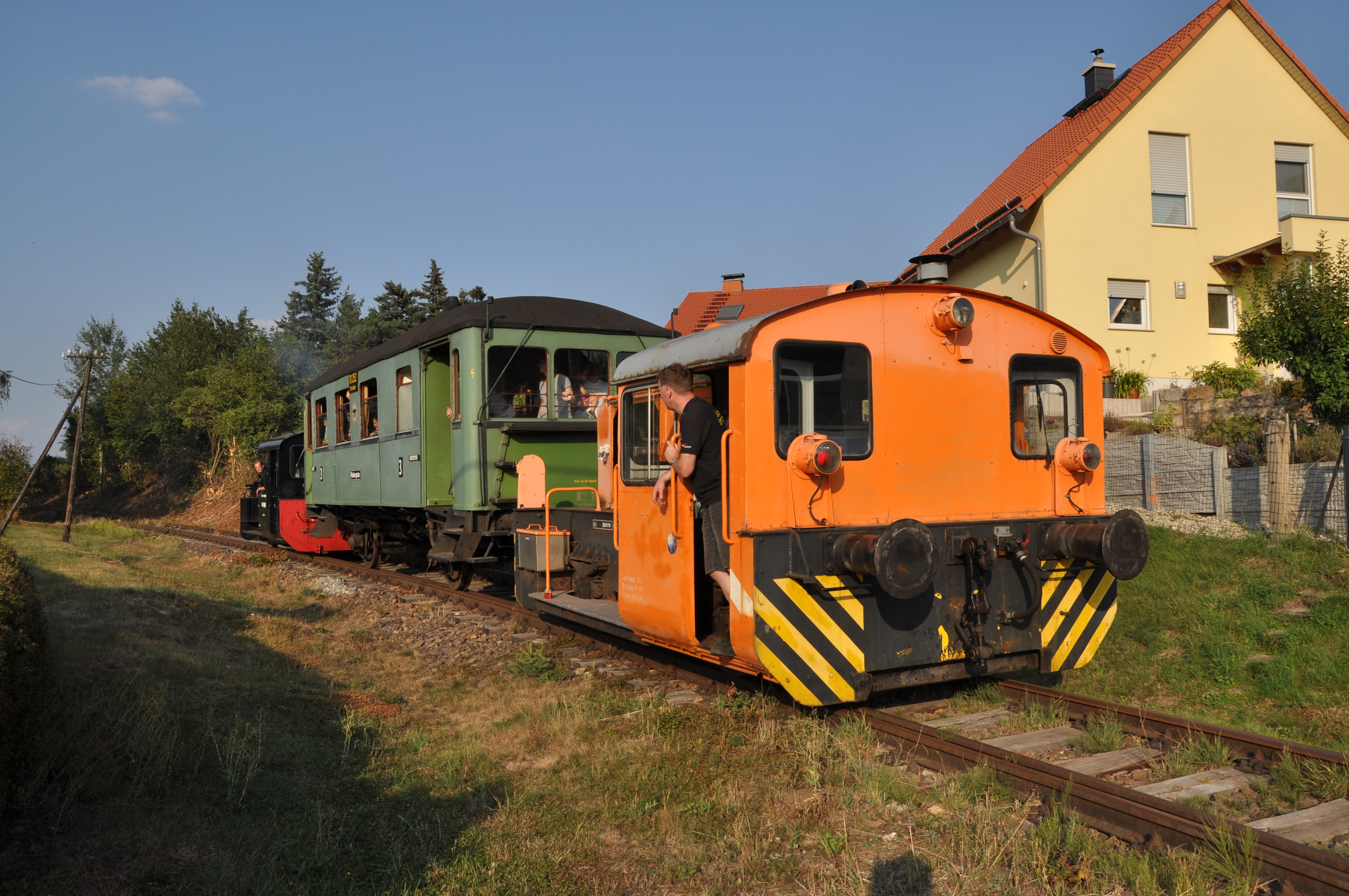 Zug des Museumsbahnvereins Windbergbahn e.V. bei einer der ersten offiziellen Fahrten seit der Streckensperrung im Jahr 1998. Befahren wurden jedoch nur ein kurzer Abschnitt von Dresden-Gittersee bis zum km 4,2 oberhalb des Kesselgrundes.